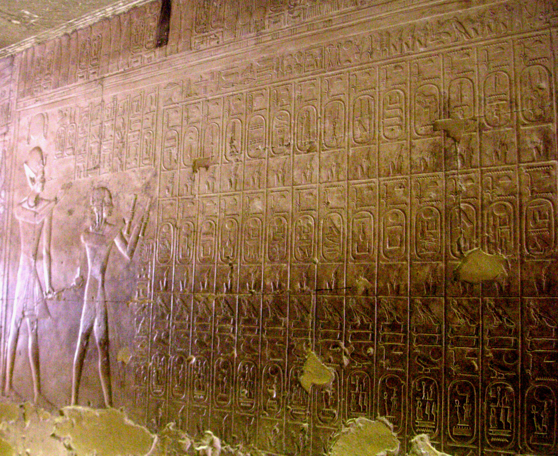 Sethos I. und sein Sohn Ramses mit der Königsliste von Abydos im alten Ägypten